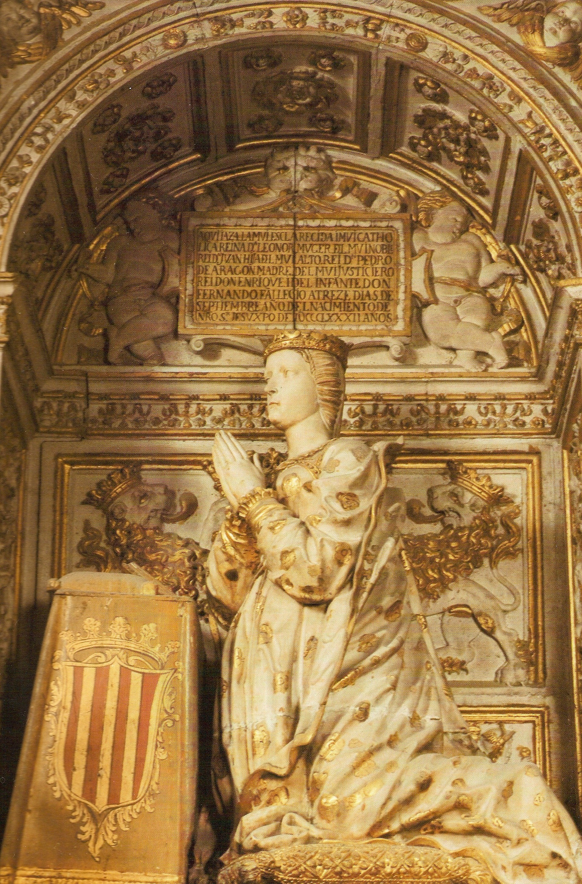 Sepulcro de la reina Leonor de Aragón (1358-1382), que fue esposa del rey Juan I de Castilla y madre de los reyes Enrique III de Castilla y Fernando I de Aragón. Se encuentra en la capilla de los Reyes Nuevos de la catedral de Toledo.